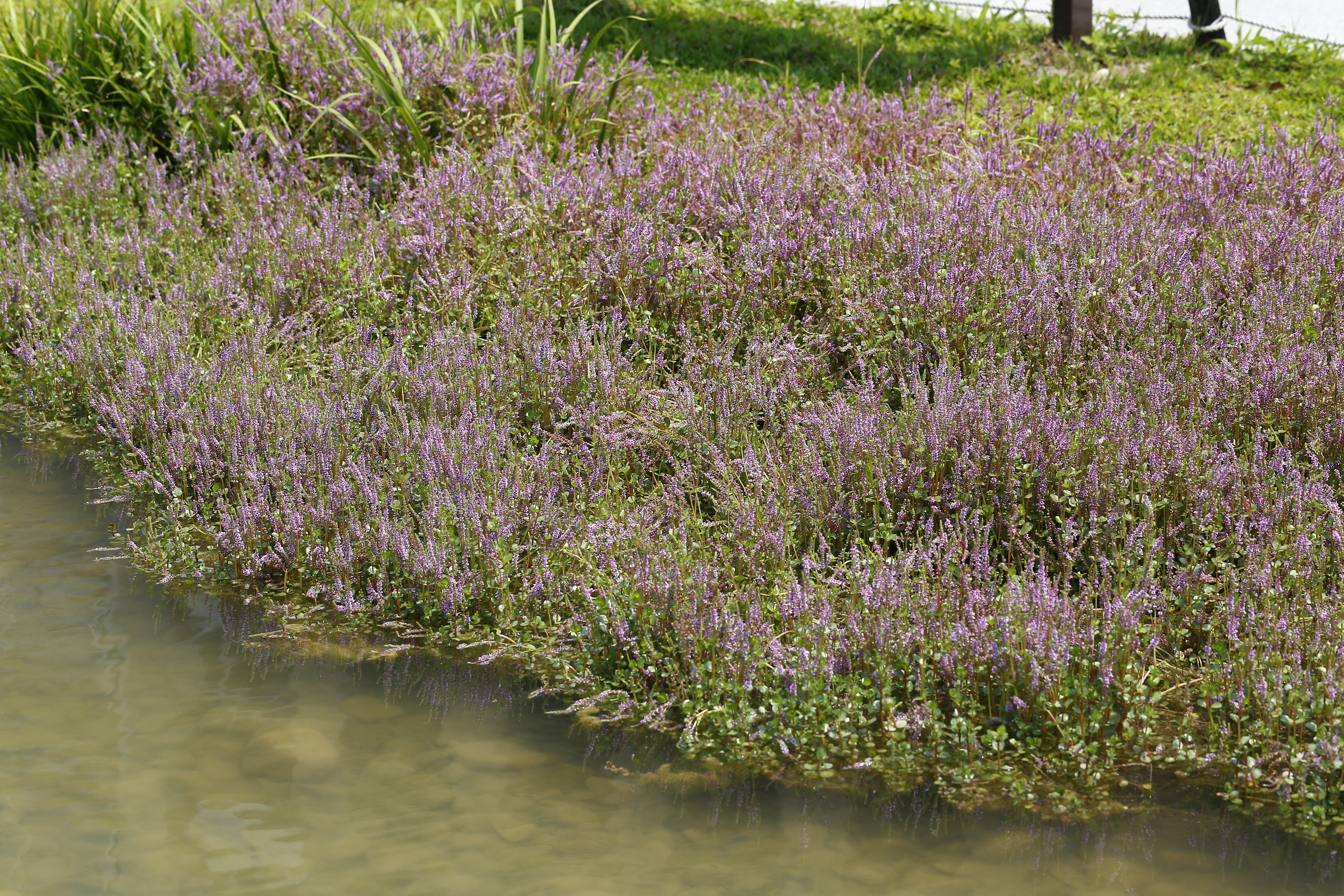 中文（台灣）: 圓葉節節菜的族群-a